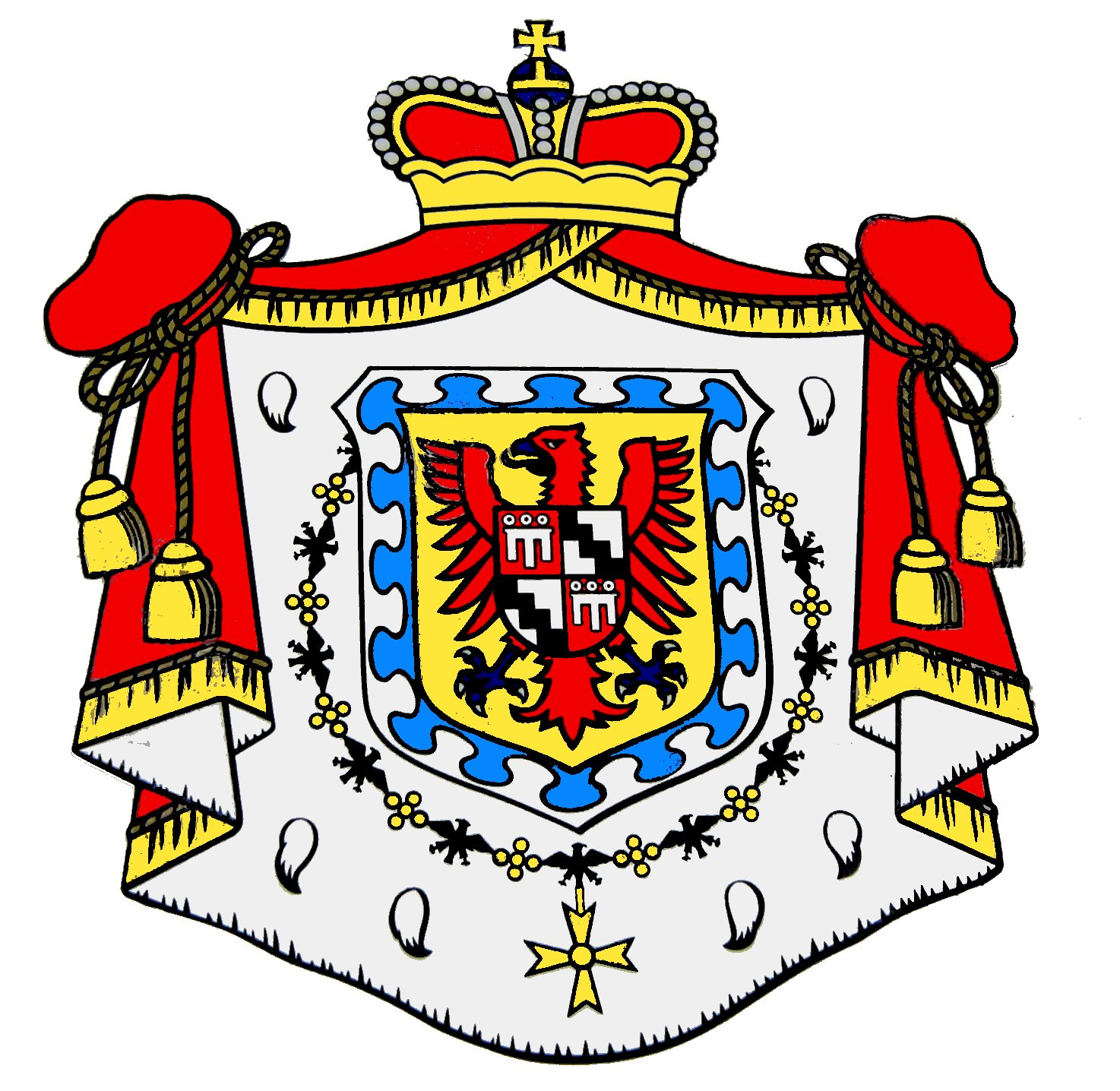 Tafel mit dem Wappen von Fürstenberg, Donaueschingen